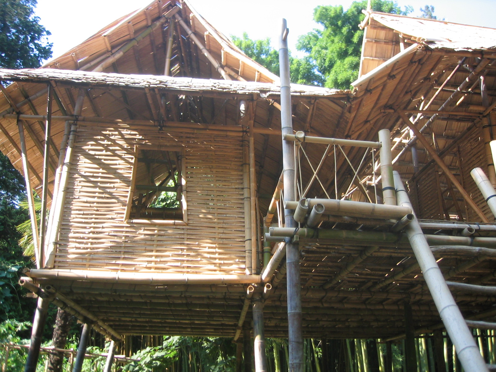 Titus zur Megede